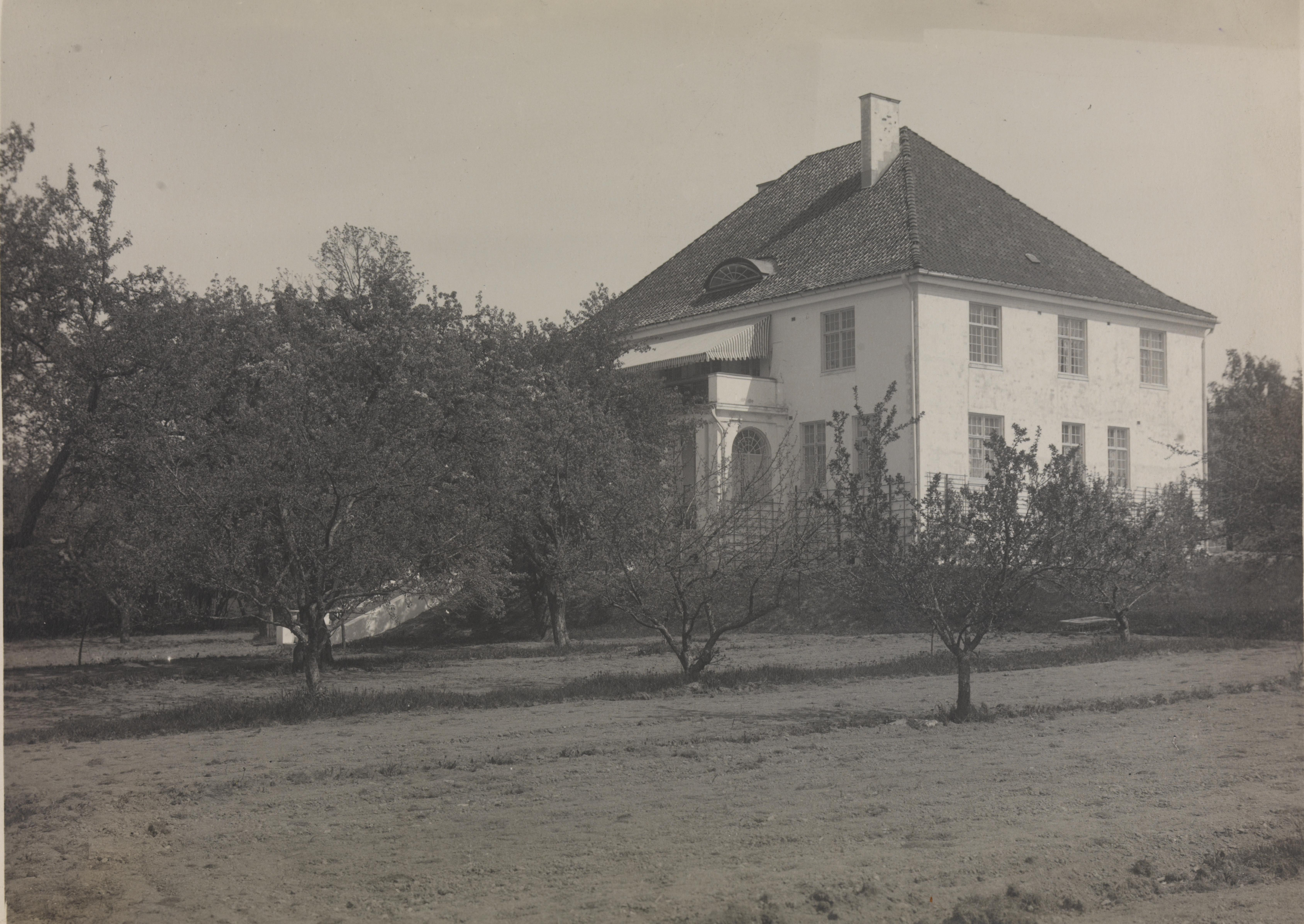 Bildet er hentet fra Nasjonalbibliotekets bildesamling Semb hovedgård, Horten, Vestfold